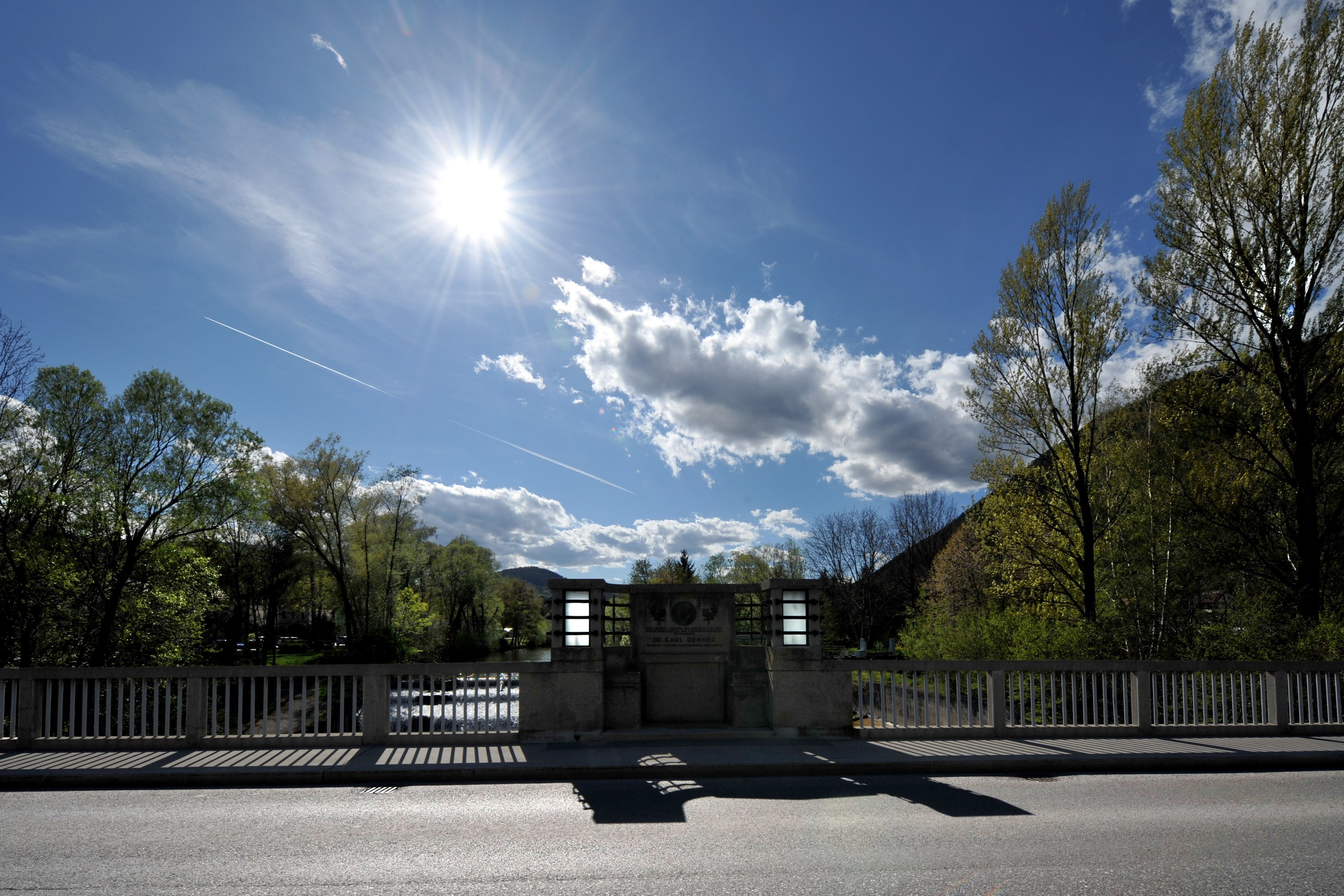 Dr. Karl Renner-Brücke